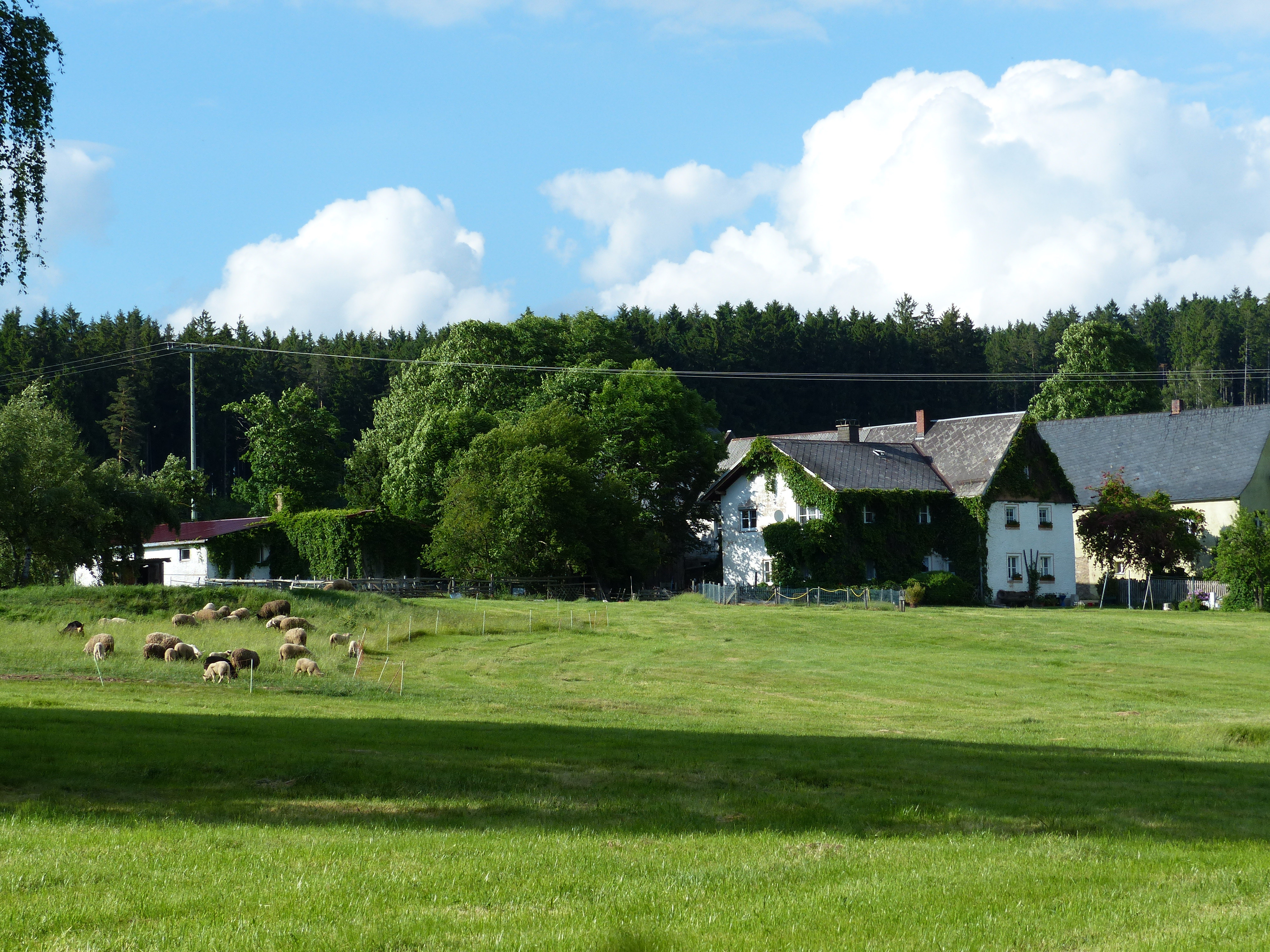 Ortsansichten von Großschloppen